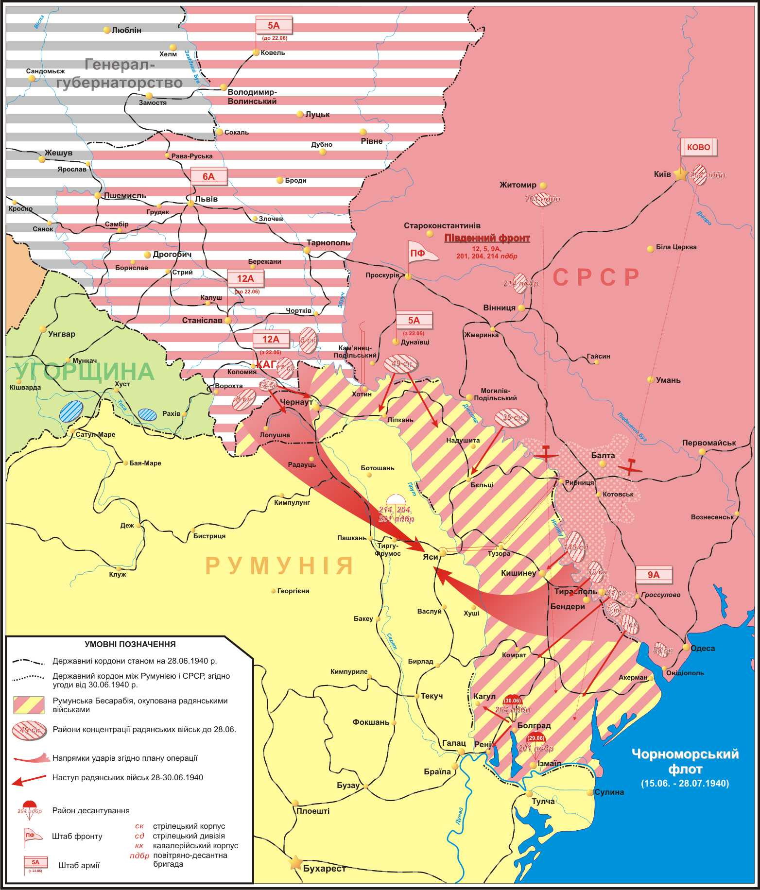 Оперативний план Бесарабсько-Буковинського походу РККА у 1940 році. 6. план Бесарабського походу (1940).